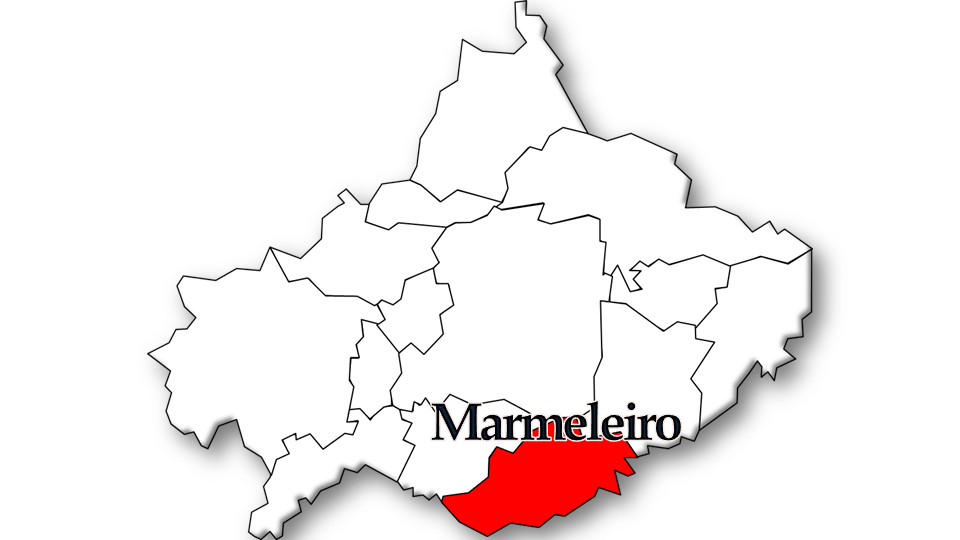 População